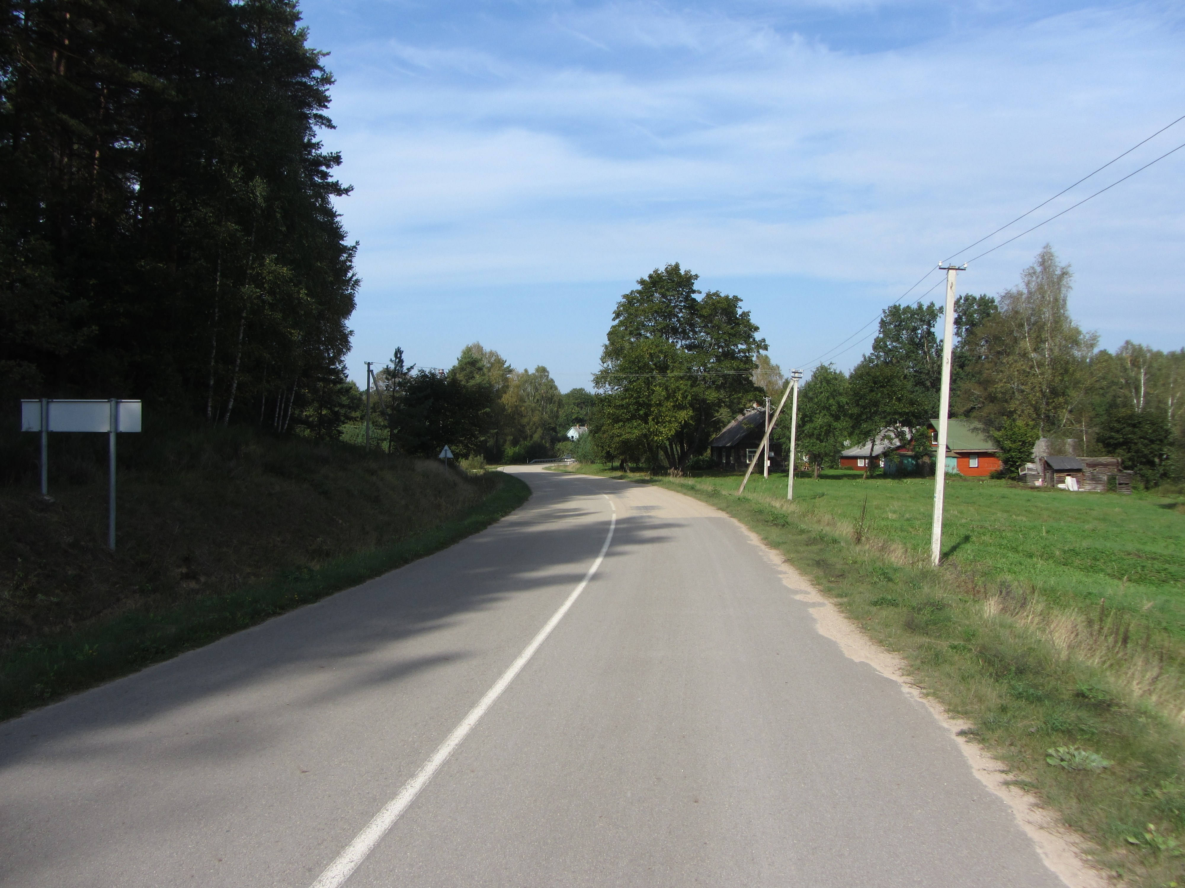 Lakaja 18201, Lithuania